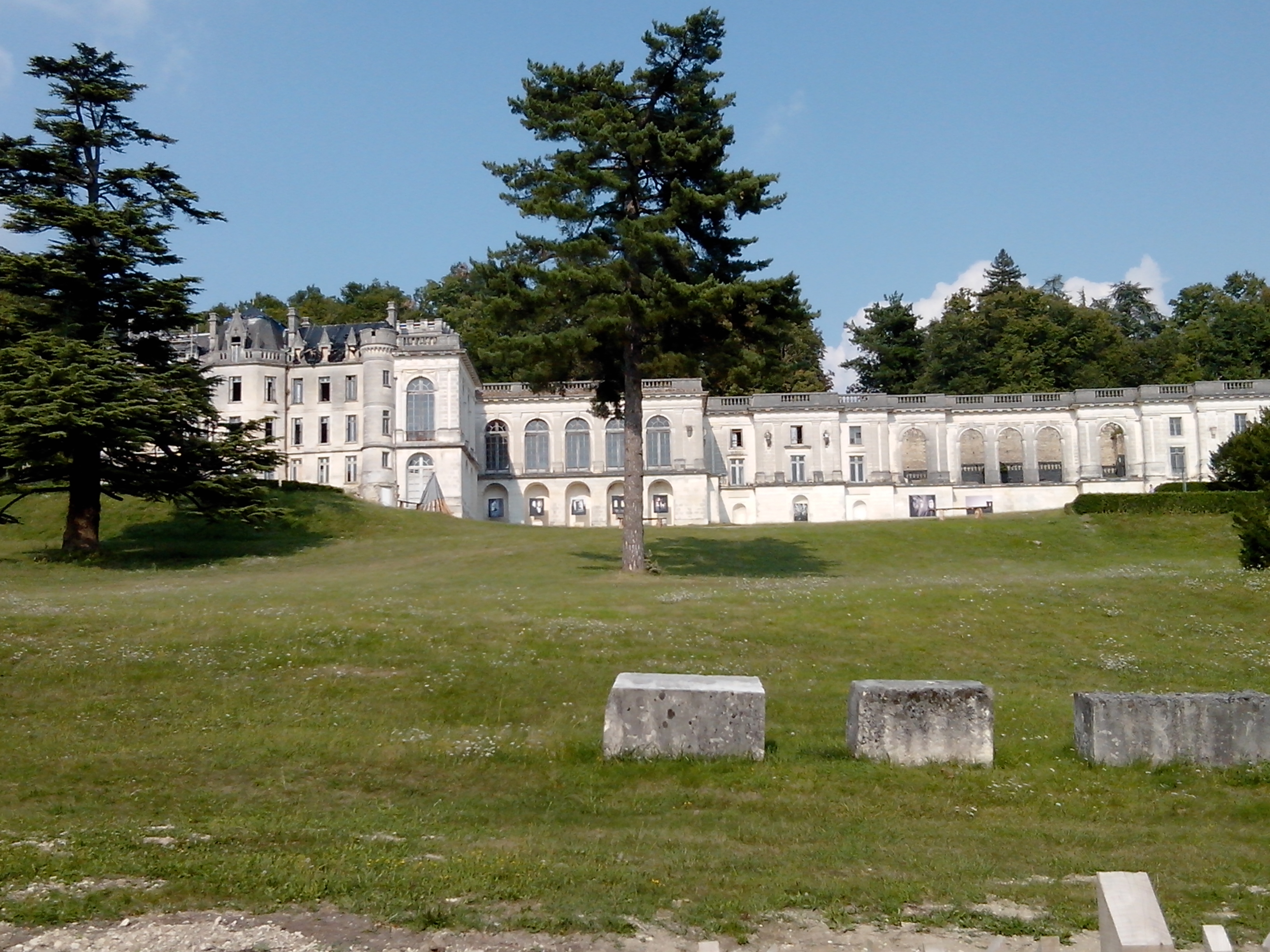 Château de la Mercerie (Inscrit) .